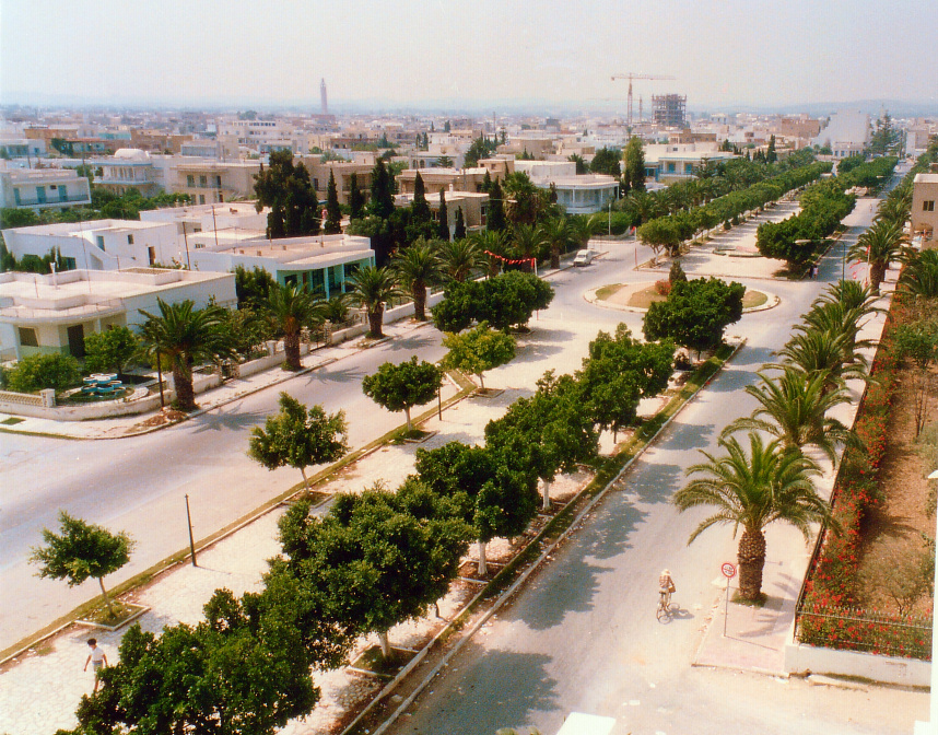 Nabeul, Hauptstraße zwischen Innenstadt und Strand